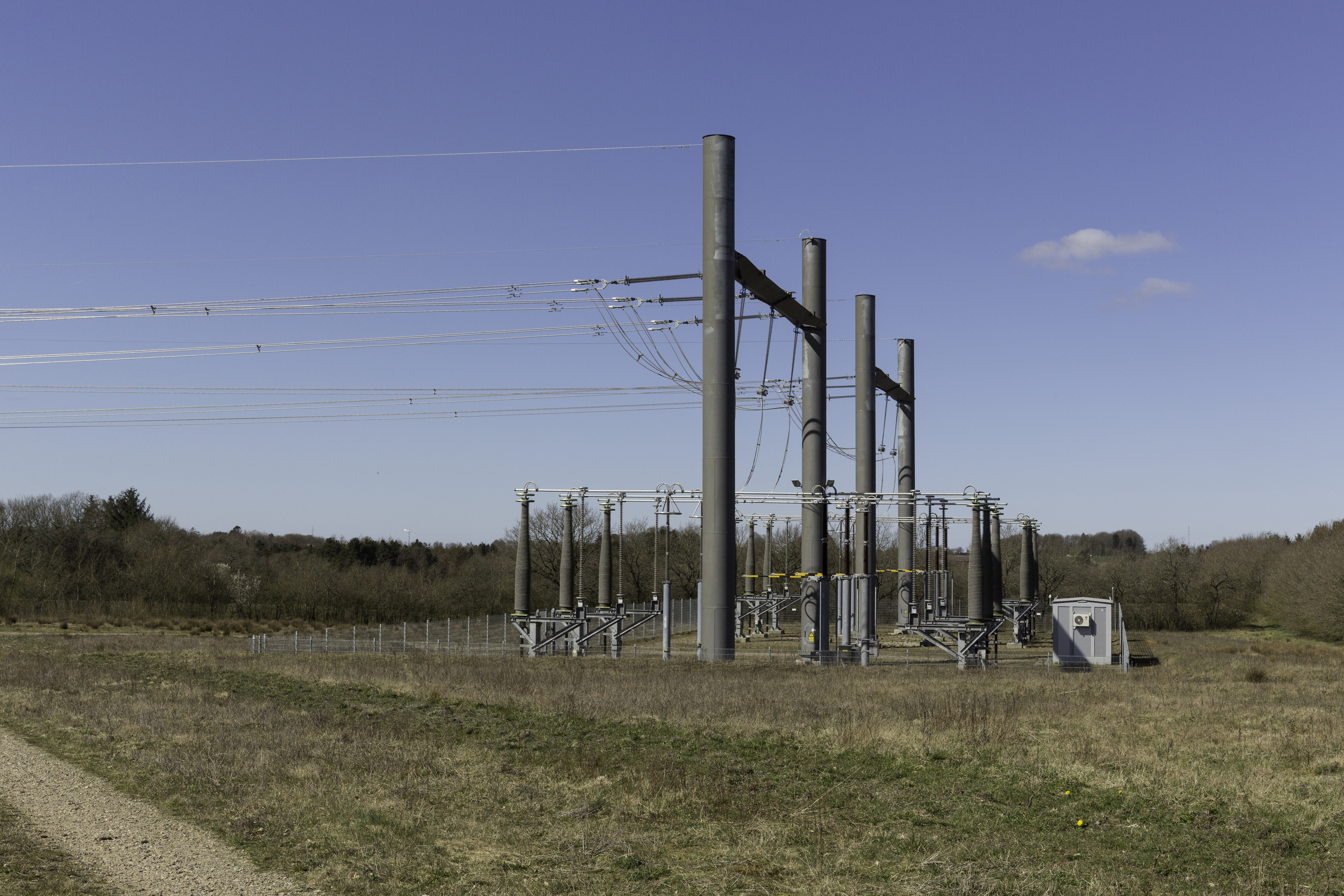 Højspændingsforbindelsen Kassø–Tjele: Forbindelsen mellem luftledninger og jordkabler sker via denne overgangsstation ved sydvestsiden af Bølling Sø ved Engesvang